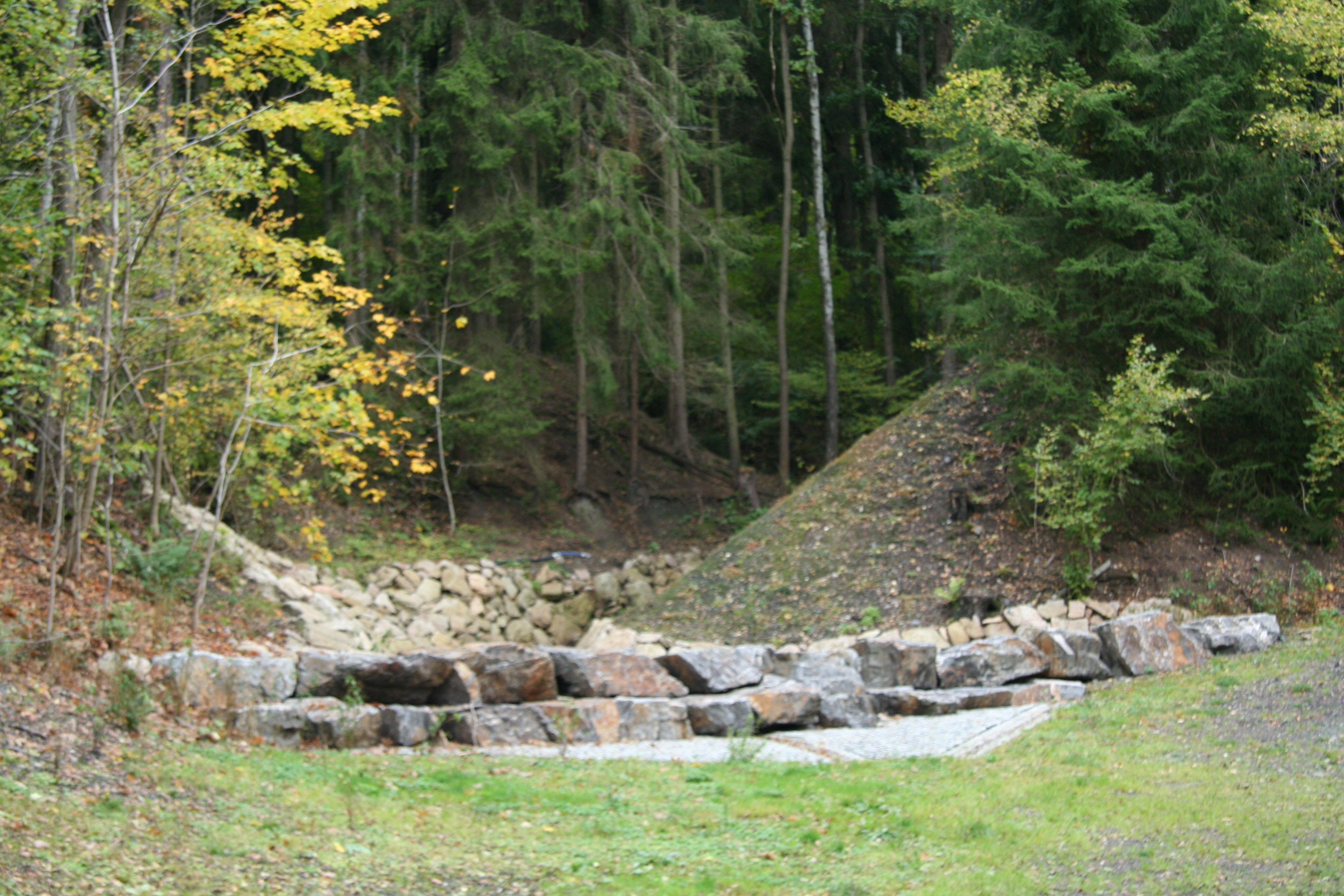 Außenanlage mit Röstbühne